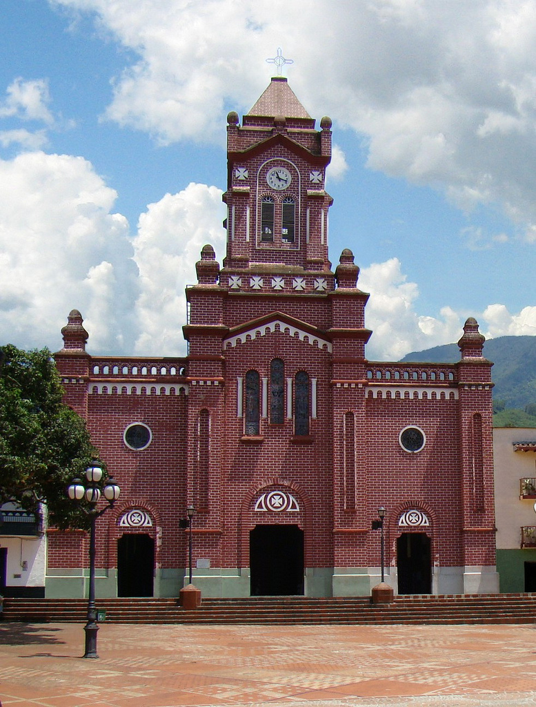 Iglesia del Municipio de San Carlos, Antioquia, Colombia